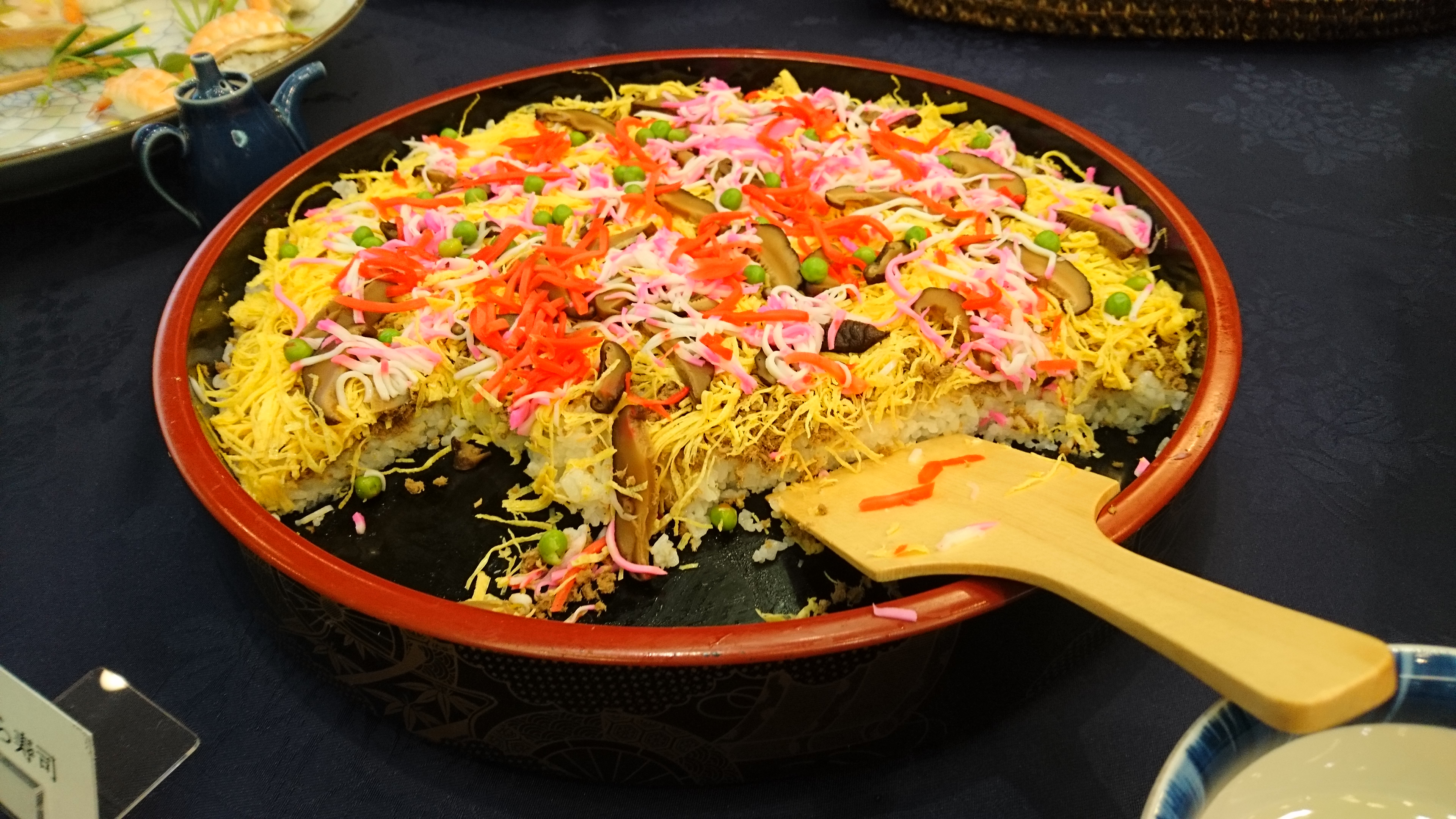 丹後地方の郷土料理